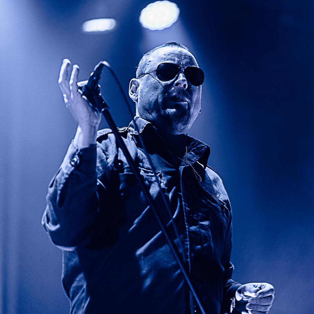 Michael Krohn - Raga Rockers. Byscenen, Trondheim 20.01 2017.